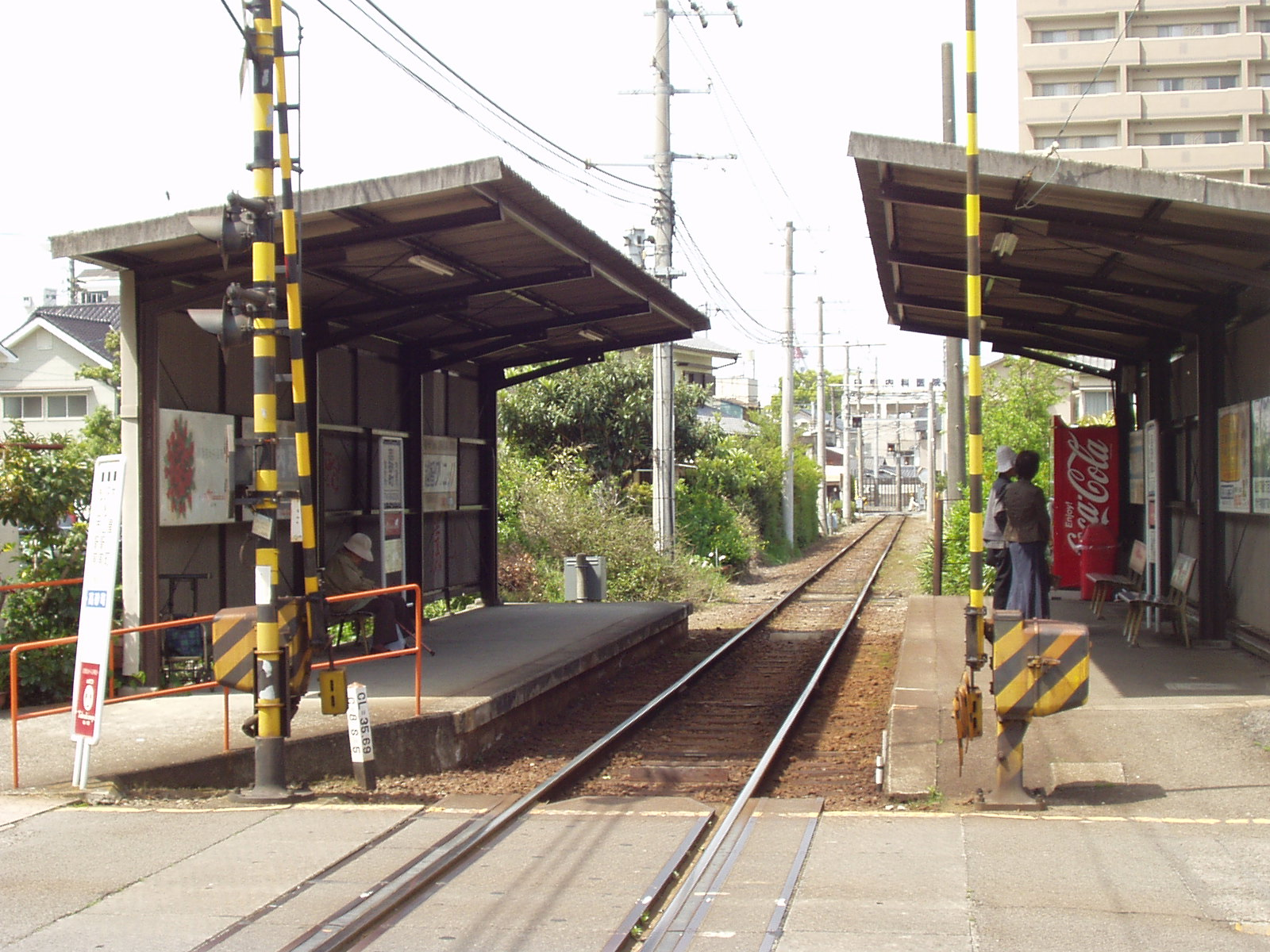 伊予鉄道城北線 高砂町駅 Iyo RailWay Jhohoku Line TakasagoCho Station at Matsuyama City Japan